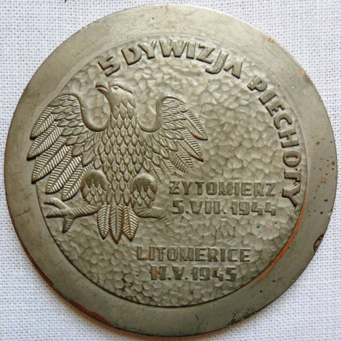 Medal pamiątkowy